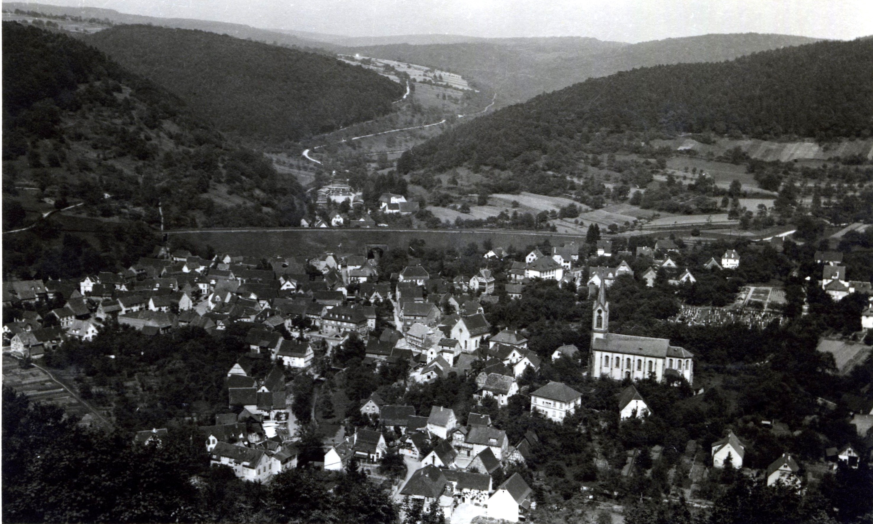 Blick auf Neckargerach im Juli oder August 1939